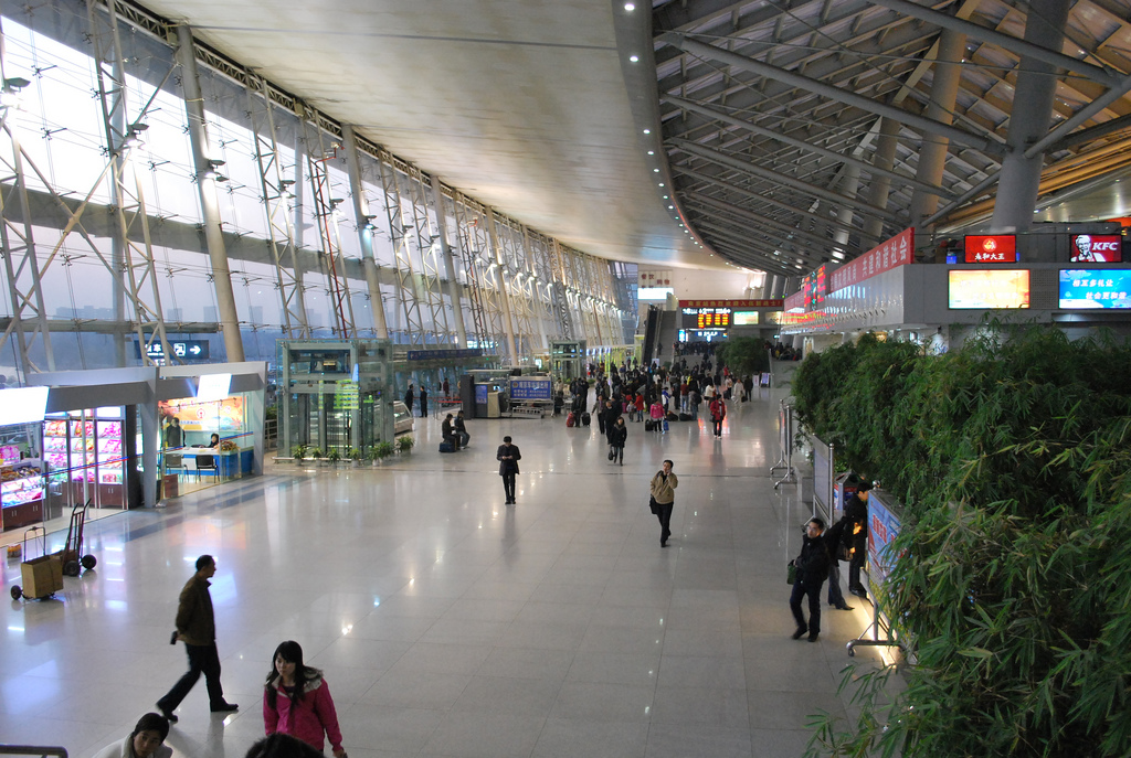 南京火车站候车大厅